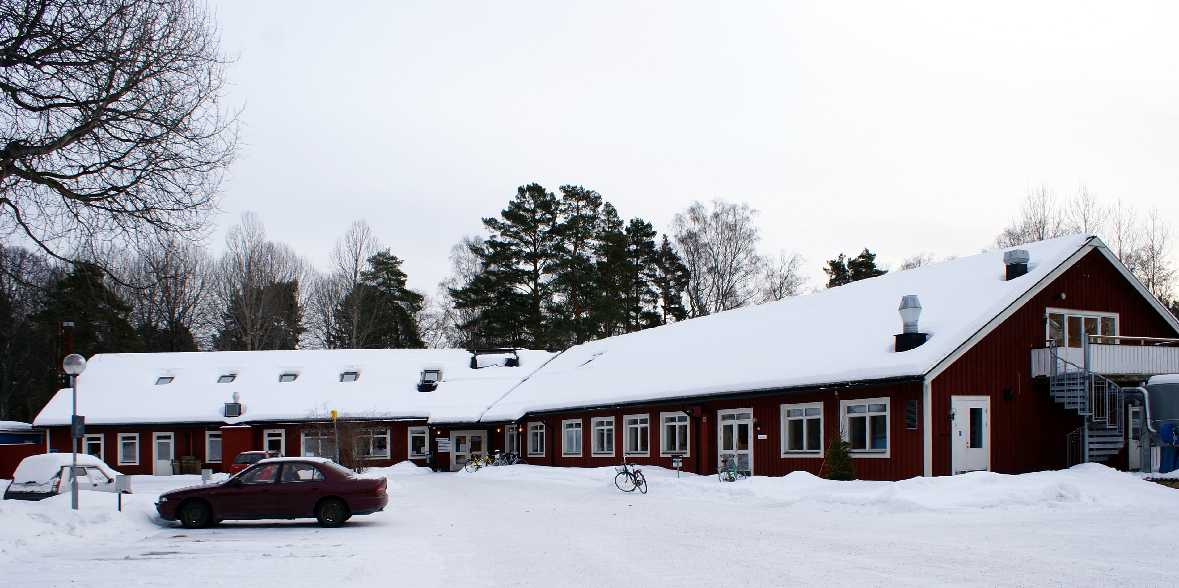 Leksands folkhögskola.